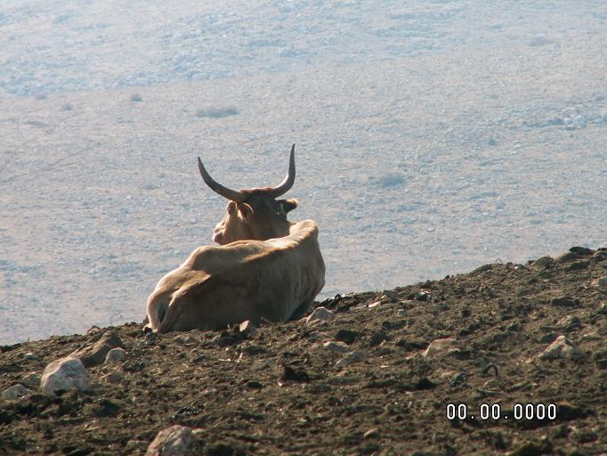 פרה על הגלבוע.